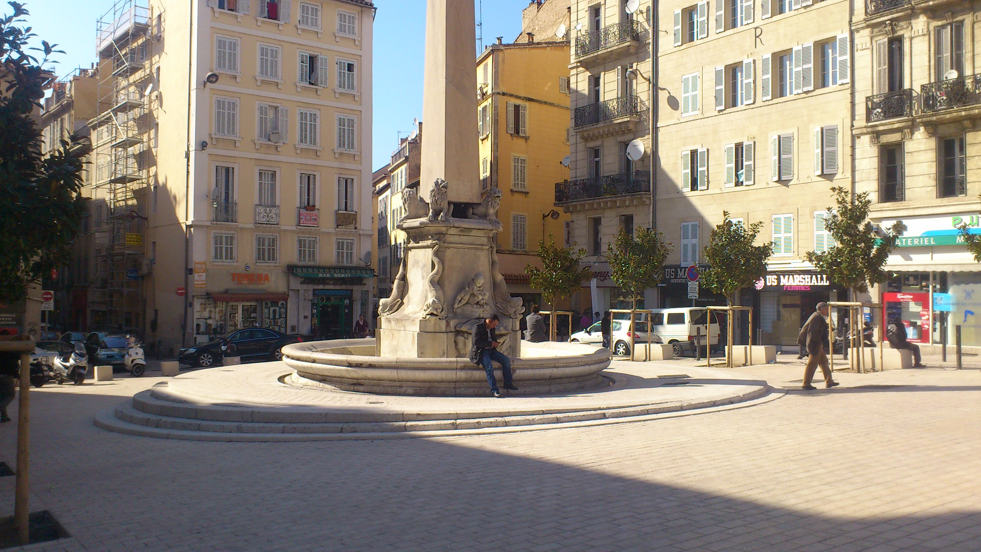 place des capucins Mars 2013 Marseille Provence France